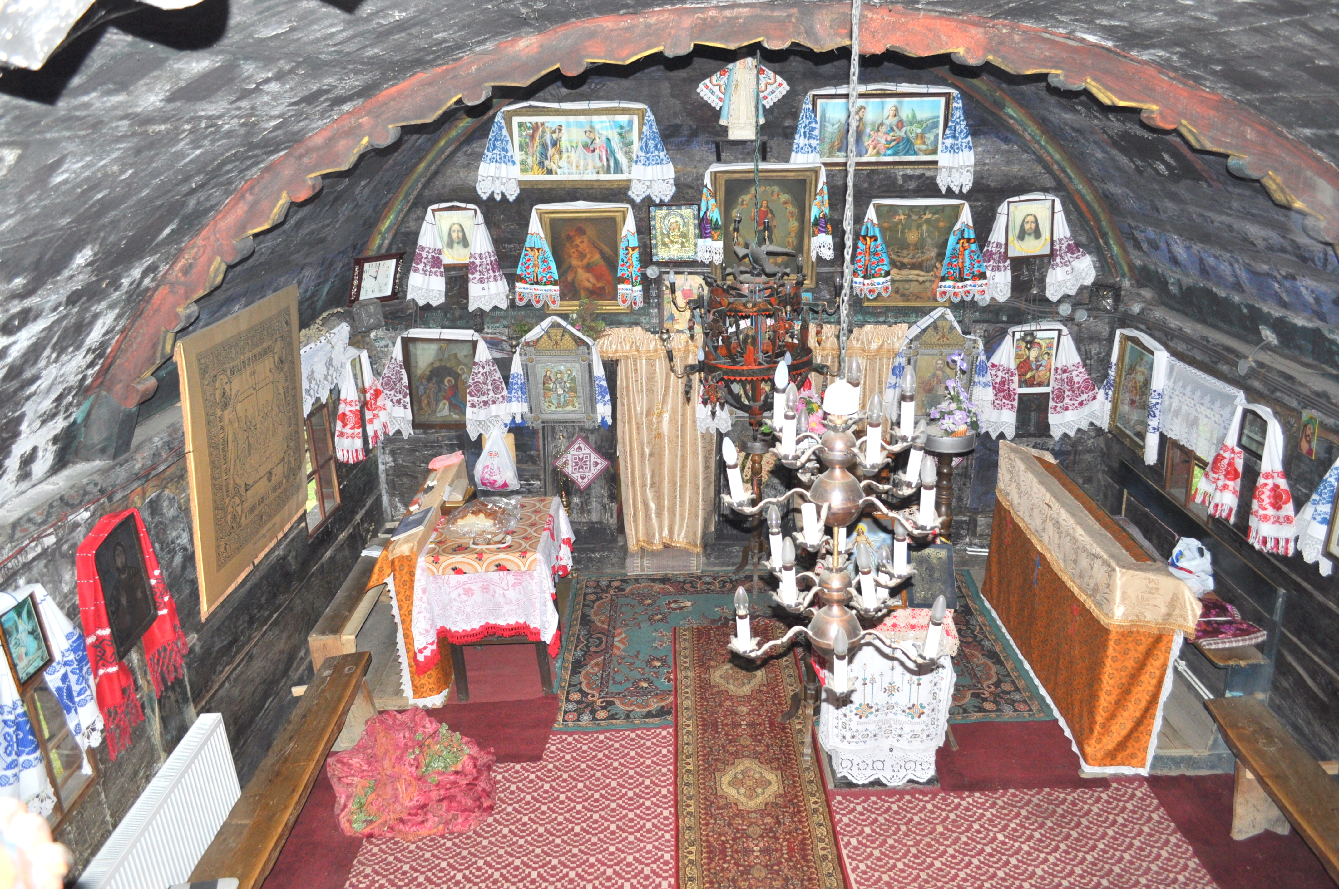 Biserica de lemn din Nadășu, județul Cluj